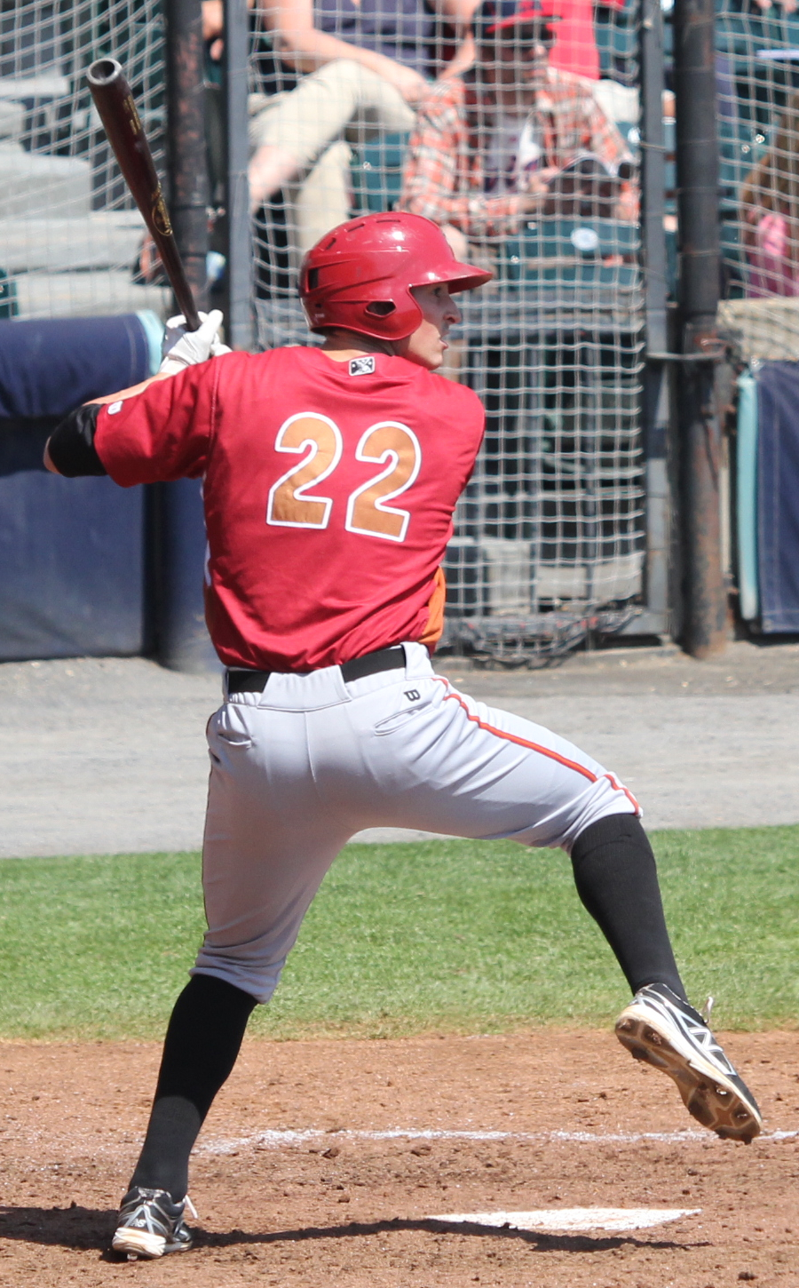 Stefan Welch